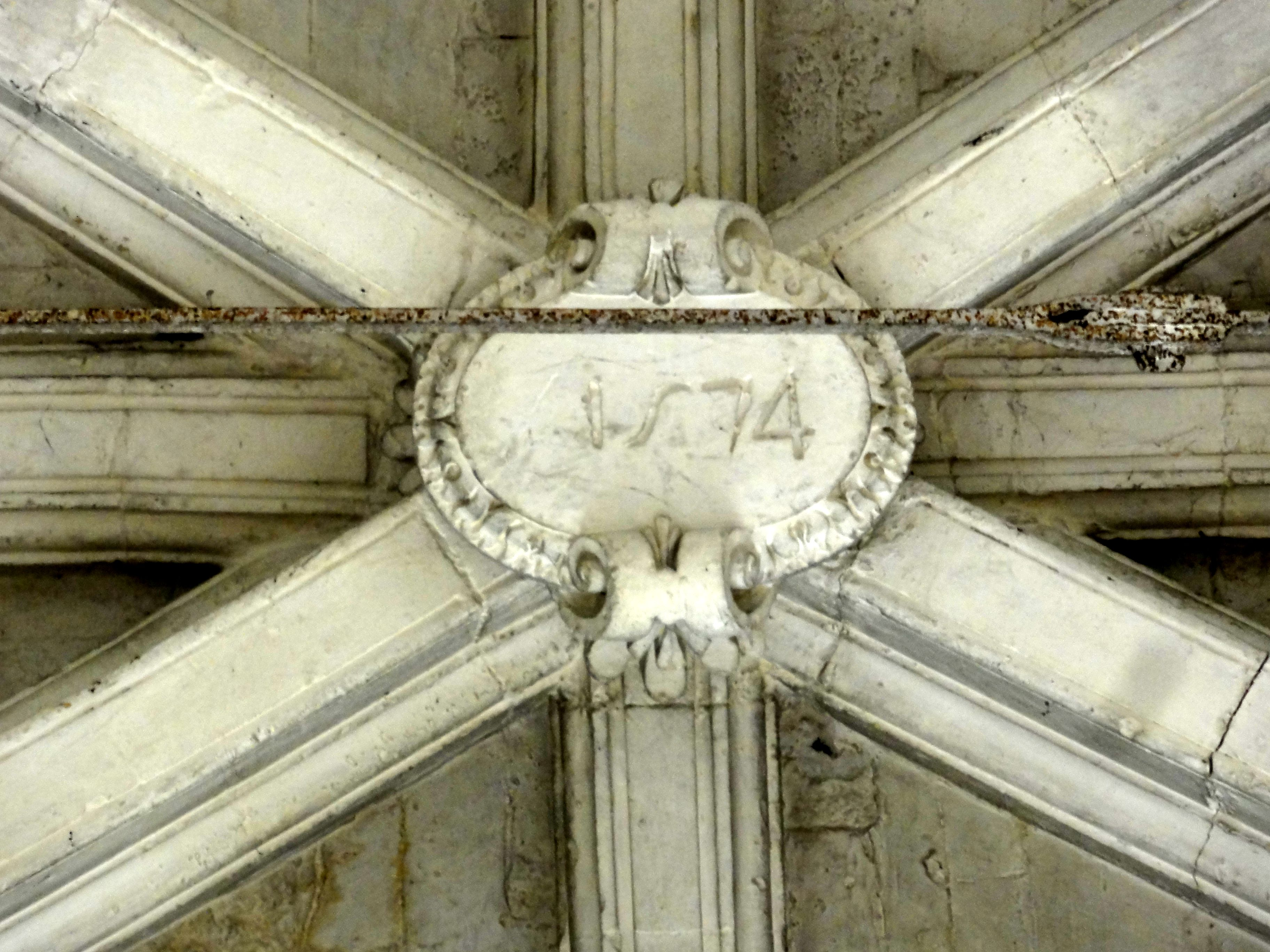 Clé de voûte de la travée centrale de la nef, portant la date de 1574.